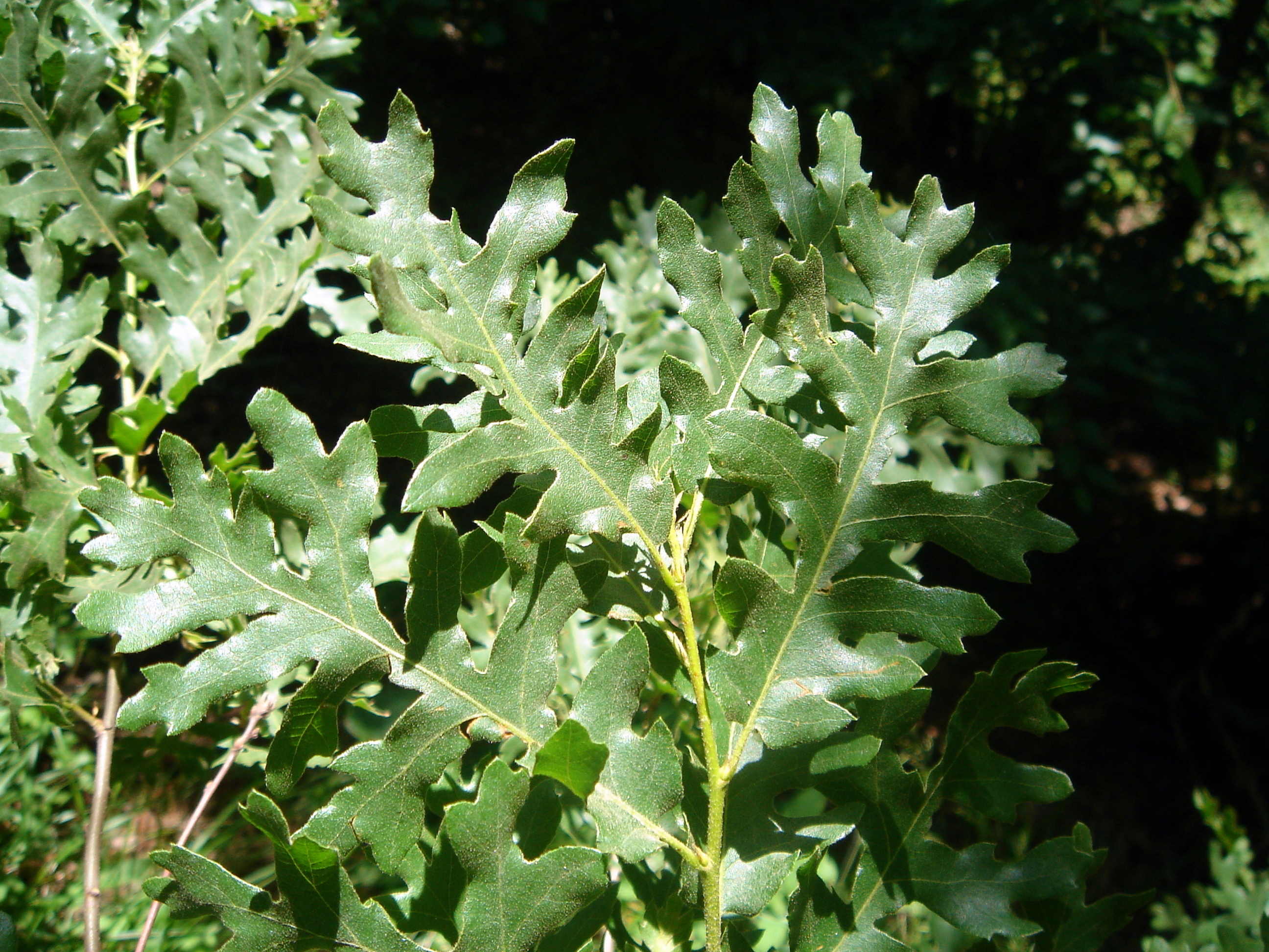 Saçlı meşe (Quercus cerris)